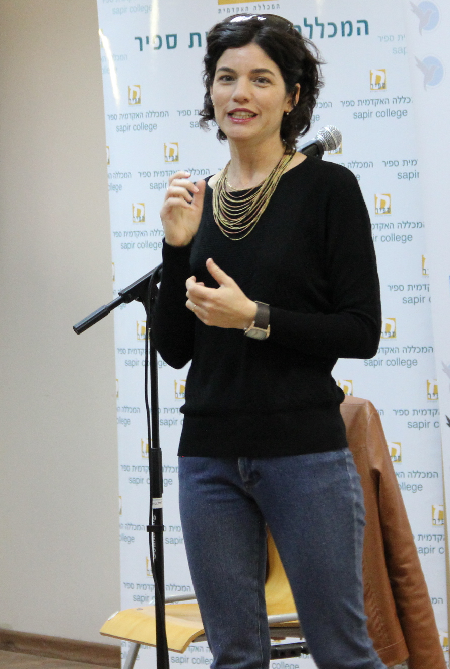 תמר זנדברג בכנס שדרות לחברה במכללה האקדמית ספיר ובעיר שדרות 2015